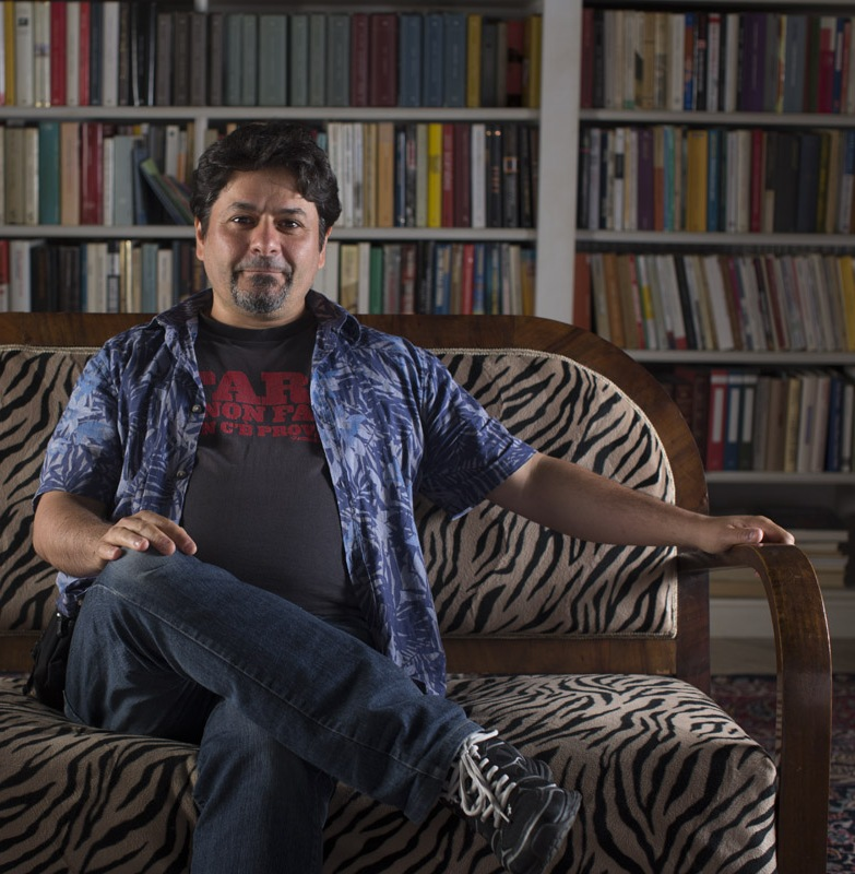 foto di Walter Menegazzi